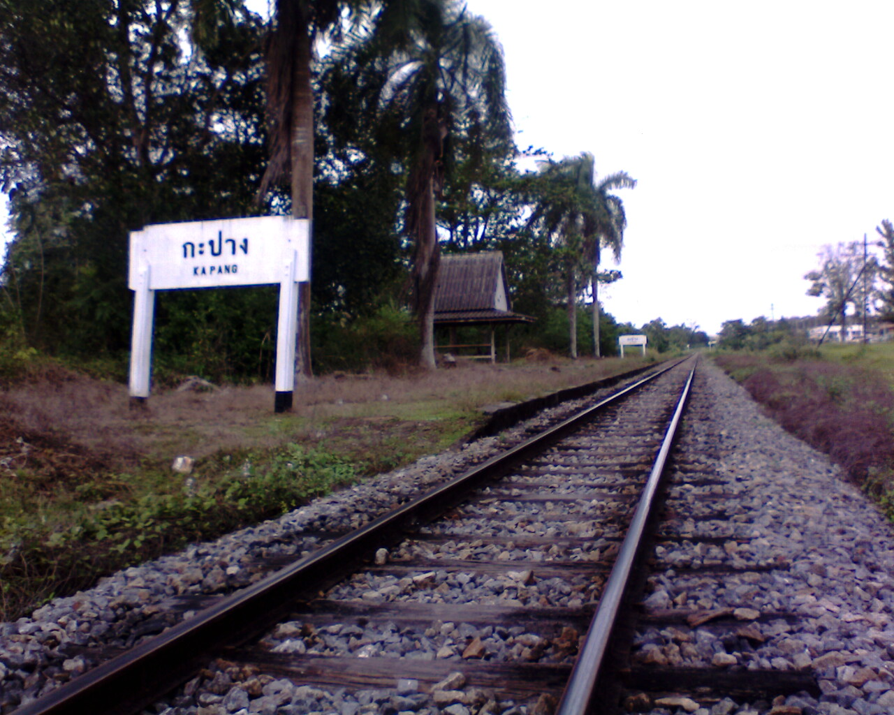 Kantang railway station